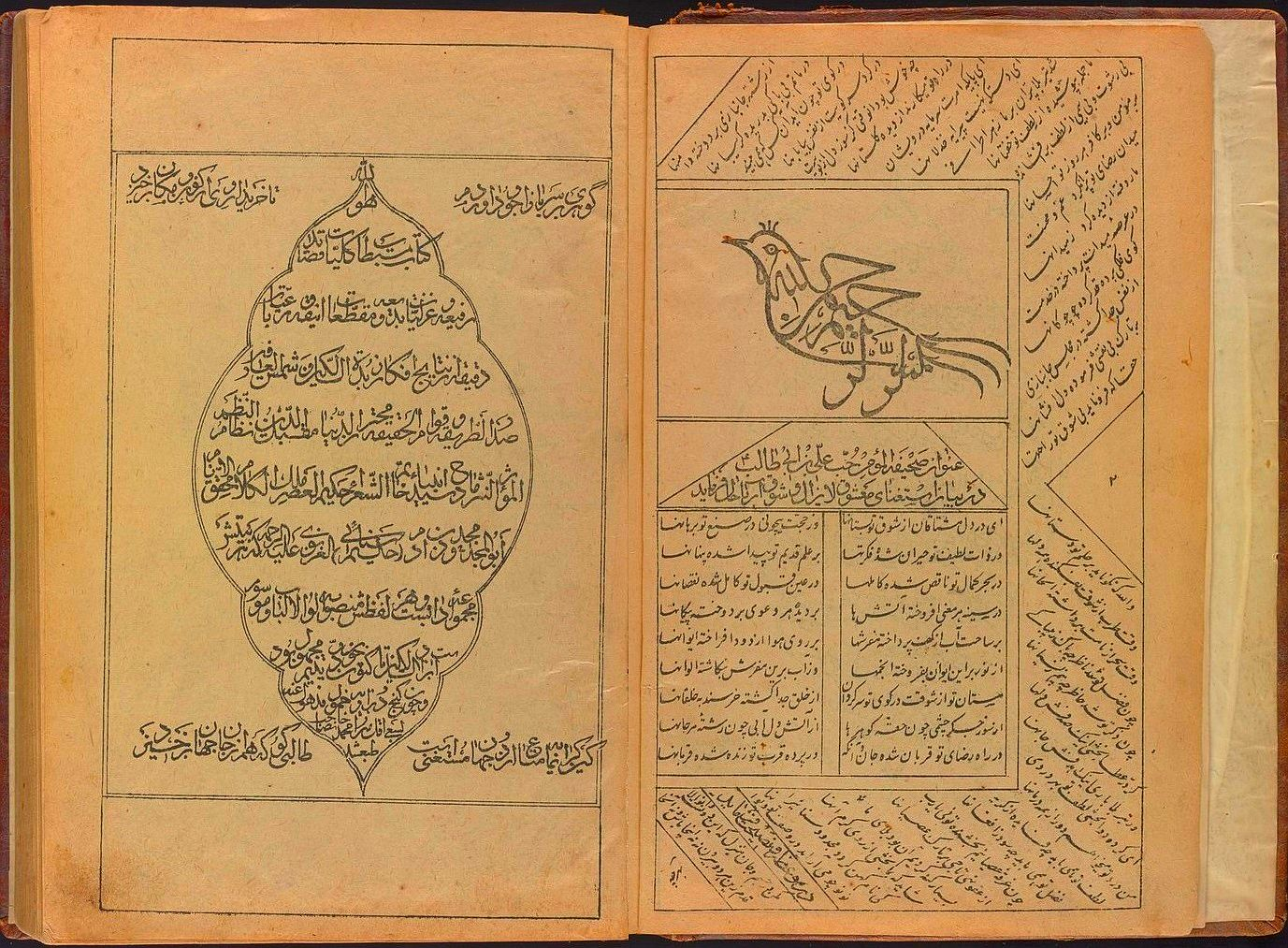 Doble página de una edición litográfica de "Recopilación de obras", "Kitāb-i mustaṭāb-i Kullīyāt-I", de Hakim Sanai (ca. 1070- ca.1150 e.c) impresa y publicada por Aqa Muhammad Jafar Saheb en Bombay, 1910.